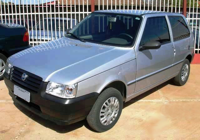 Brazilian Fiat Mille (Uno), last facelift version